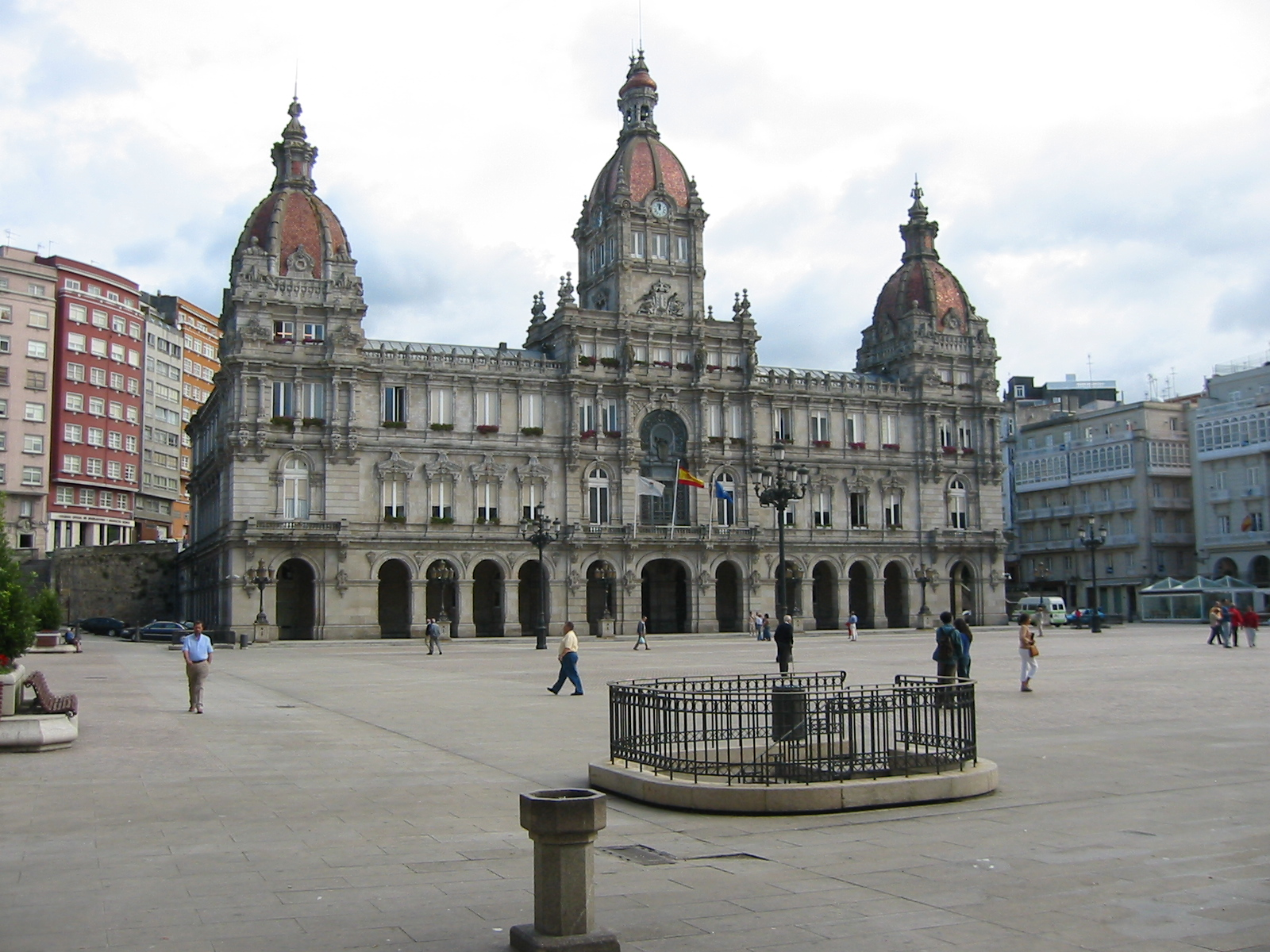 Praza de María Pita, A Coruña